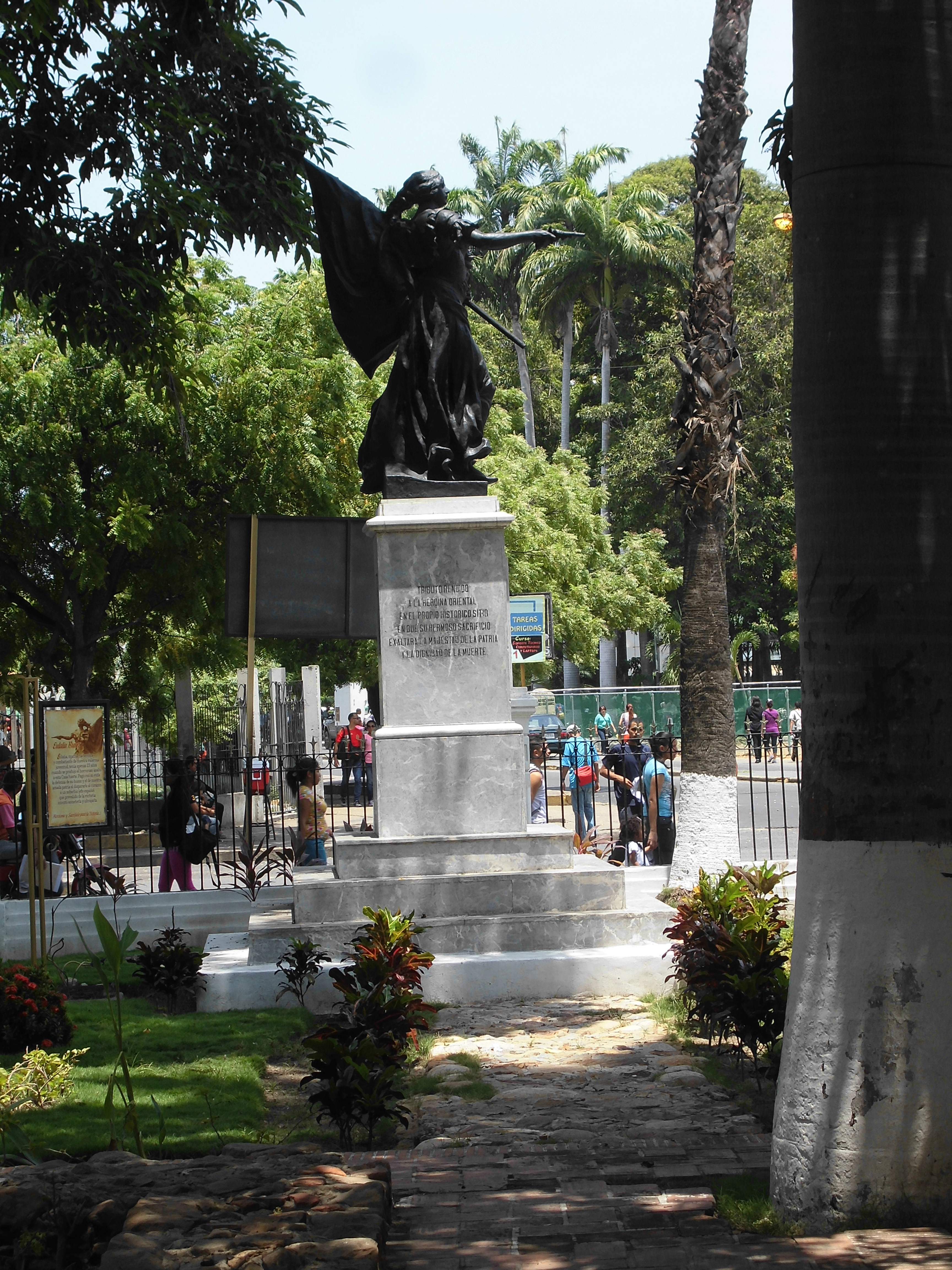 Tributo reunido a la heroina oriental. Avenida Caracas entre Calle Zamora y Avenida 5 de Julio sector Casco Central